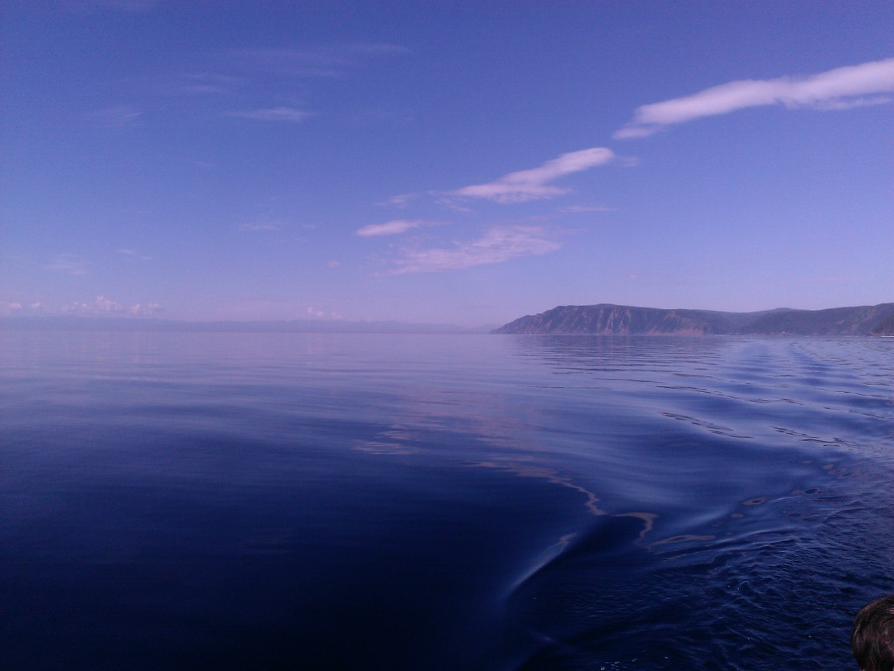 Исток реки Ангары, Иркутский район This image is related to the protected area of Russia number 3810094